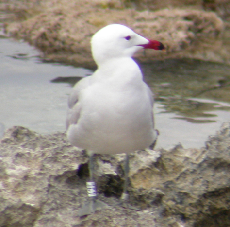 Korallenmöwe (Ichthyaetus audouinii) von vorne, Ort "Punta de ses Portes " Ibiza, Spanien